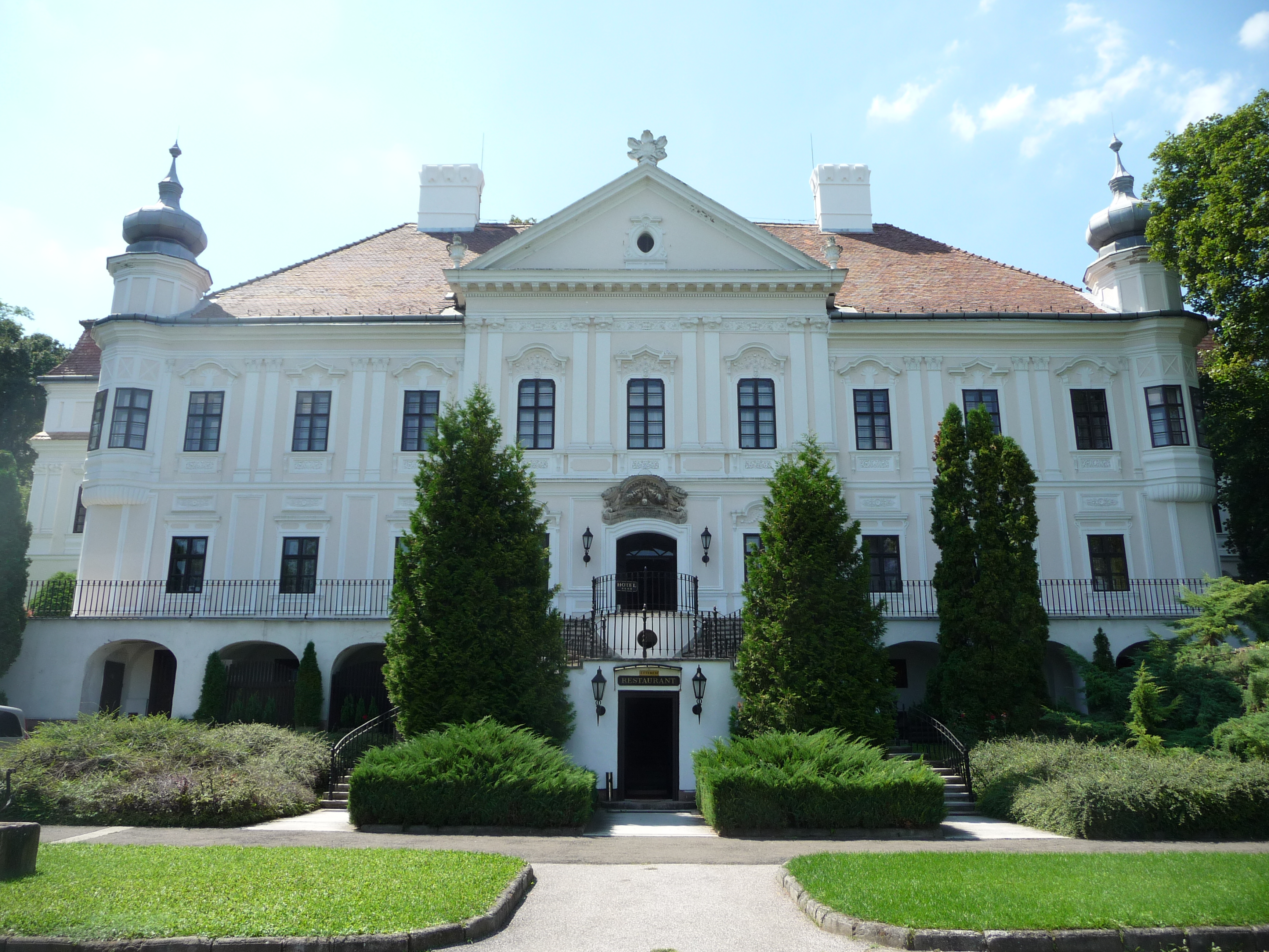 Teleki Mansion, Hungary